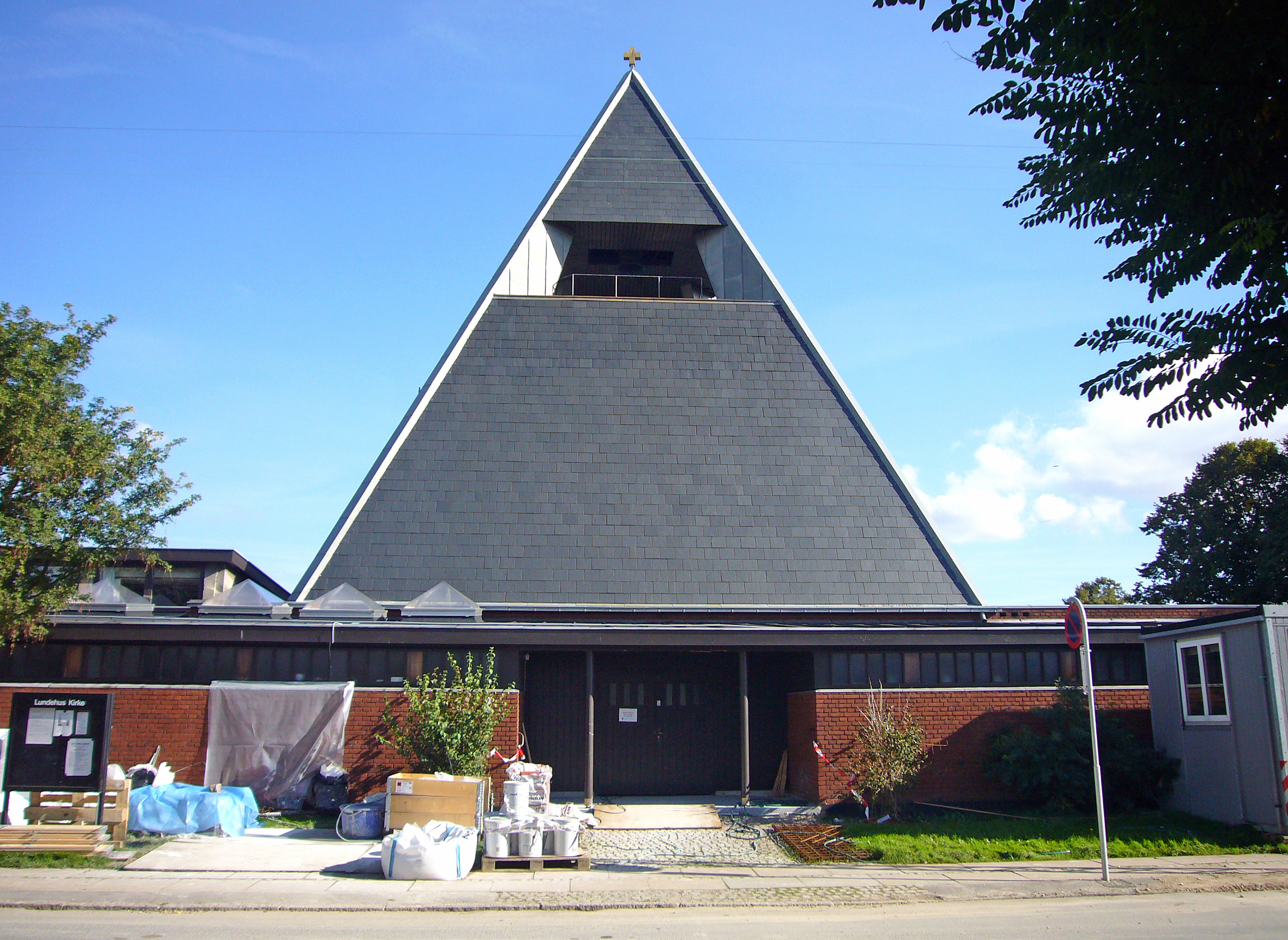 Lundehus Kirke, Copenhagen, Denmark. Lundehus Kirke during remodelling.